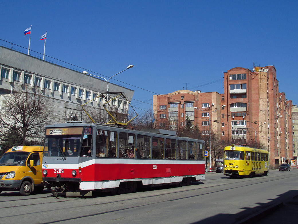 Улица Радищева Вагон законсервирован в марте 2015 года